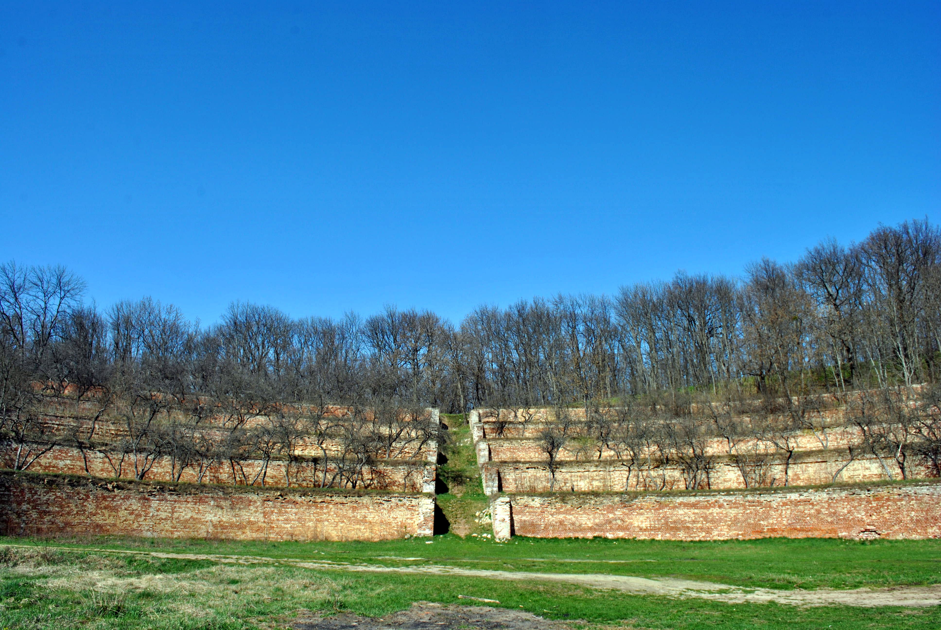 Терасний сад садиби Харитненків (сучасне використання — споруди), Городнє